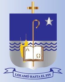 Escudo Episcopal de Mons. Martorell